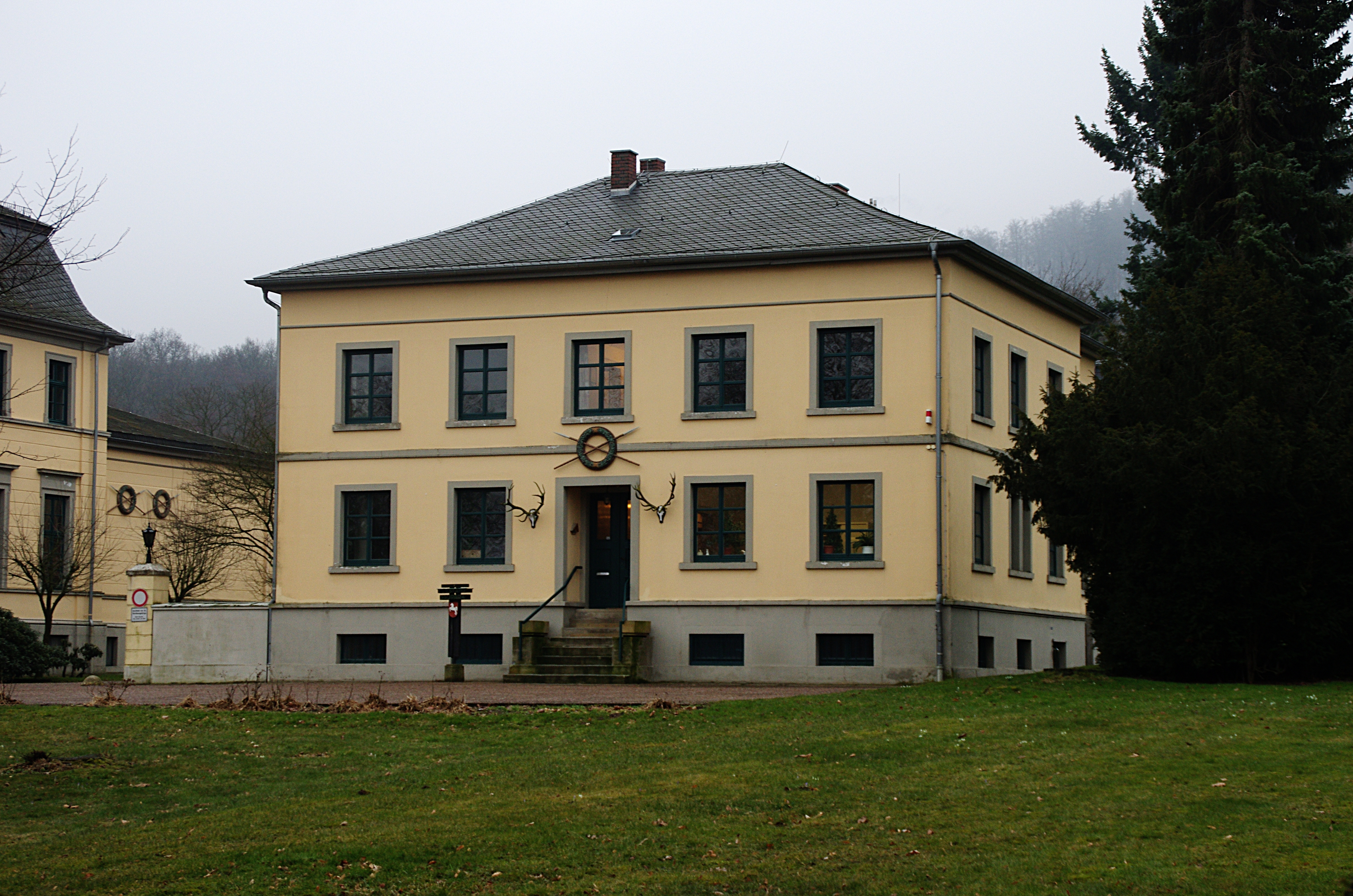 Springe in Niedersachsen. Das Haus, die Adresse steht im Namen der Datei, steht unter Denkmalschutz.